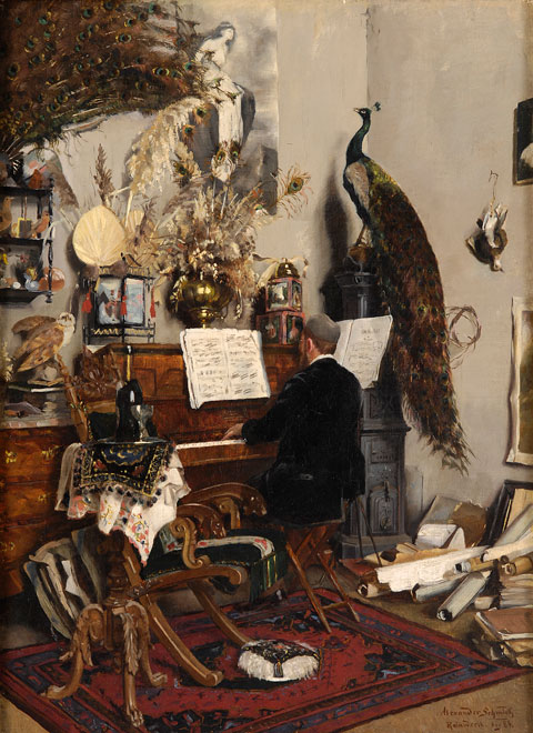 Mußestunde, bezeichnet „Rolandseck August (18)84“, Öl auf Leinwand, 57 x 41,5 cm